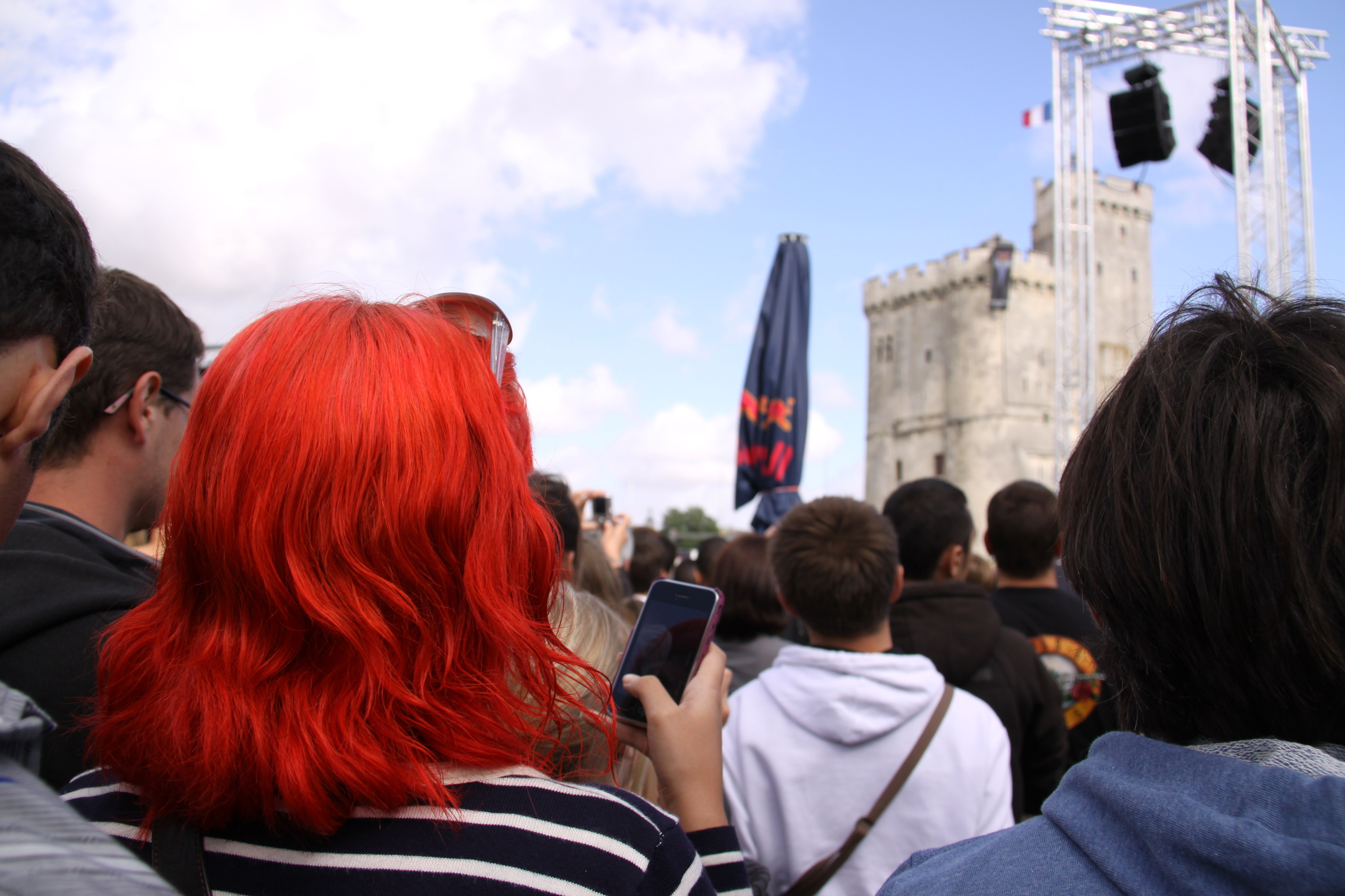 Jeune fille à la chevelure rouge et au téléphone mobile sur le port de La Rochelle. Cette photographie a été prise lors de l' arrêt à La Rochelle du championnat Red Bull Cliff Diving World Series 2011.La Rochelle, Charente Maritime, France.